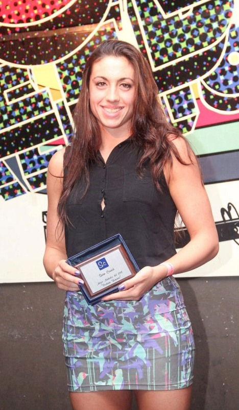 Fiesta de Fin de año de la Natación Argentina y reconocimiento a los mejores nadadores del 2012.